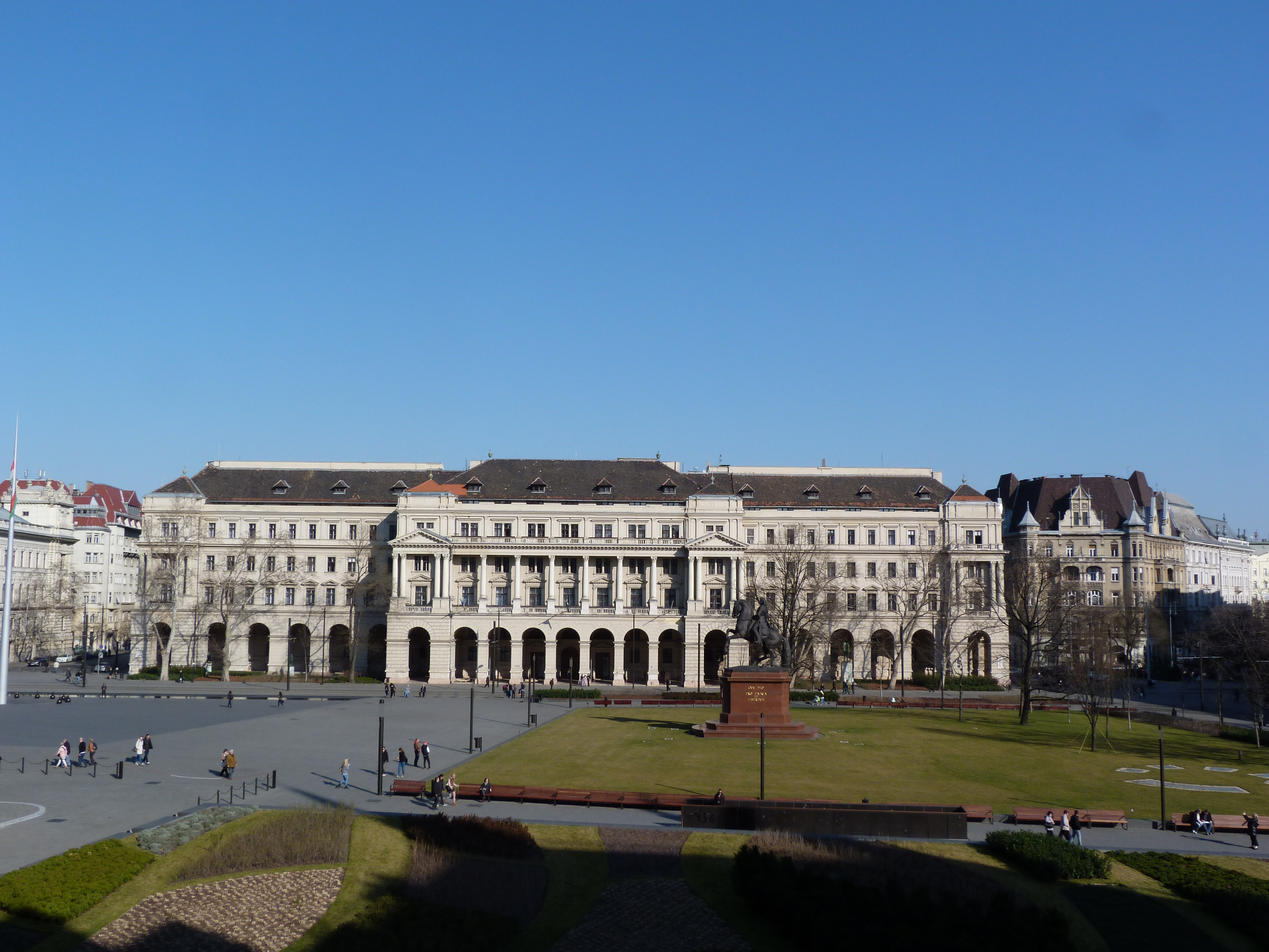 A felvétel 2015. március 18-án készült Budapesten. Földművelésügyi Minisztérium, Kossuth tér. ©© Derzsi Elekes Andor, Budapest, 2015, A fénykép másolását és felhasználását a szerző ellenérték nélkül, jogutódjaira is kihatóan megengedi. Az engedély kiterjed a kereskedelmi célú hasznosításra is. Kéri azonban nevének feltüntetését a felhasználás során. A Metapolisz sorozat valamennyi képe és filmje Creative Commons alatti. kereskedelmi - for profit - célra is felhasználható. Ajánlott hivatkozás: Derzsi Elekes Andor: Metapolisz DVD line